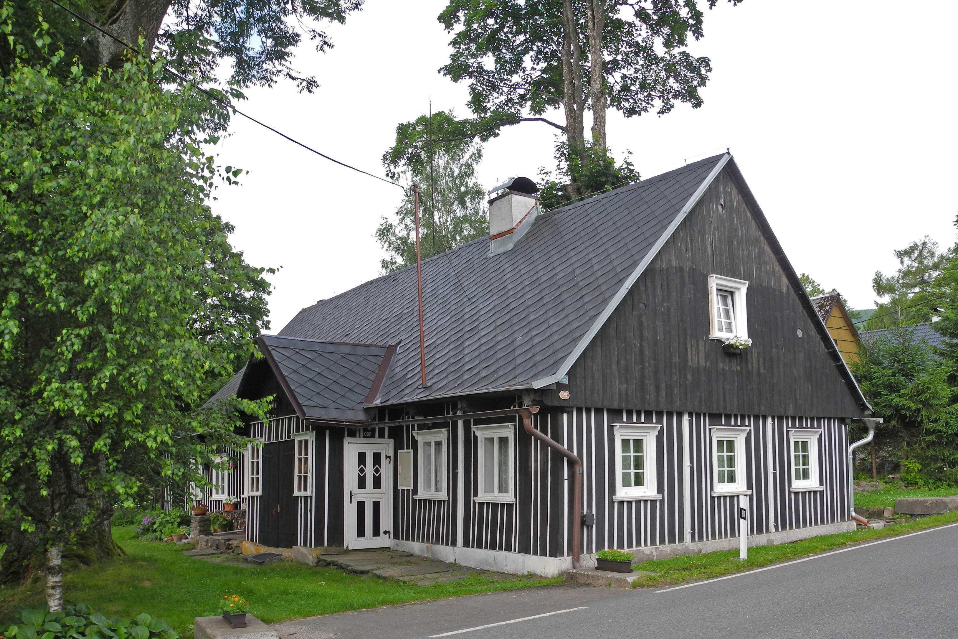 Volksarchitektur in Orlické Záhoří, OT Kerndorf (Jadrná), im Adlergebirge